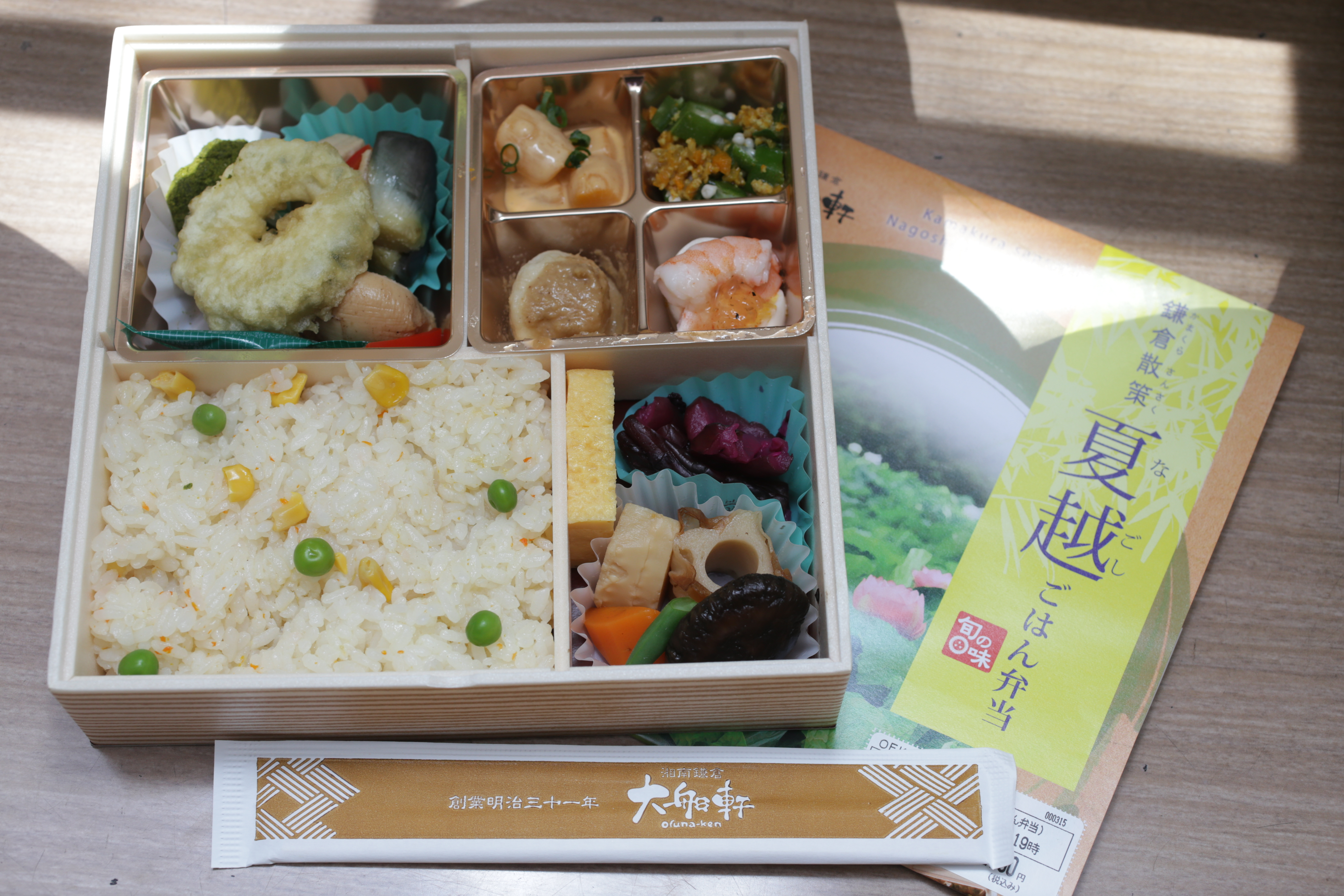 大船軒が季節限定で販売する、「鎌倉散策 夏越ごはん弁当」.